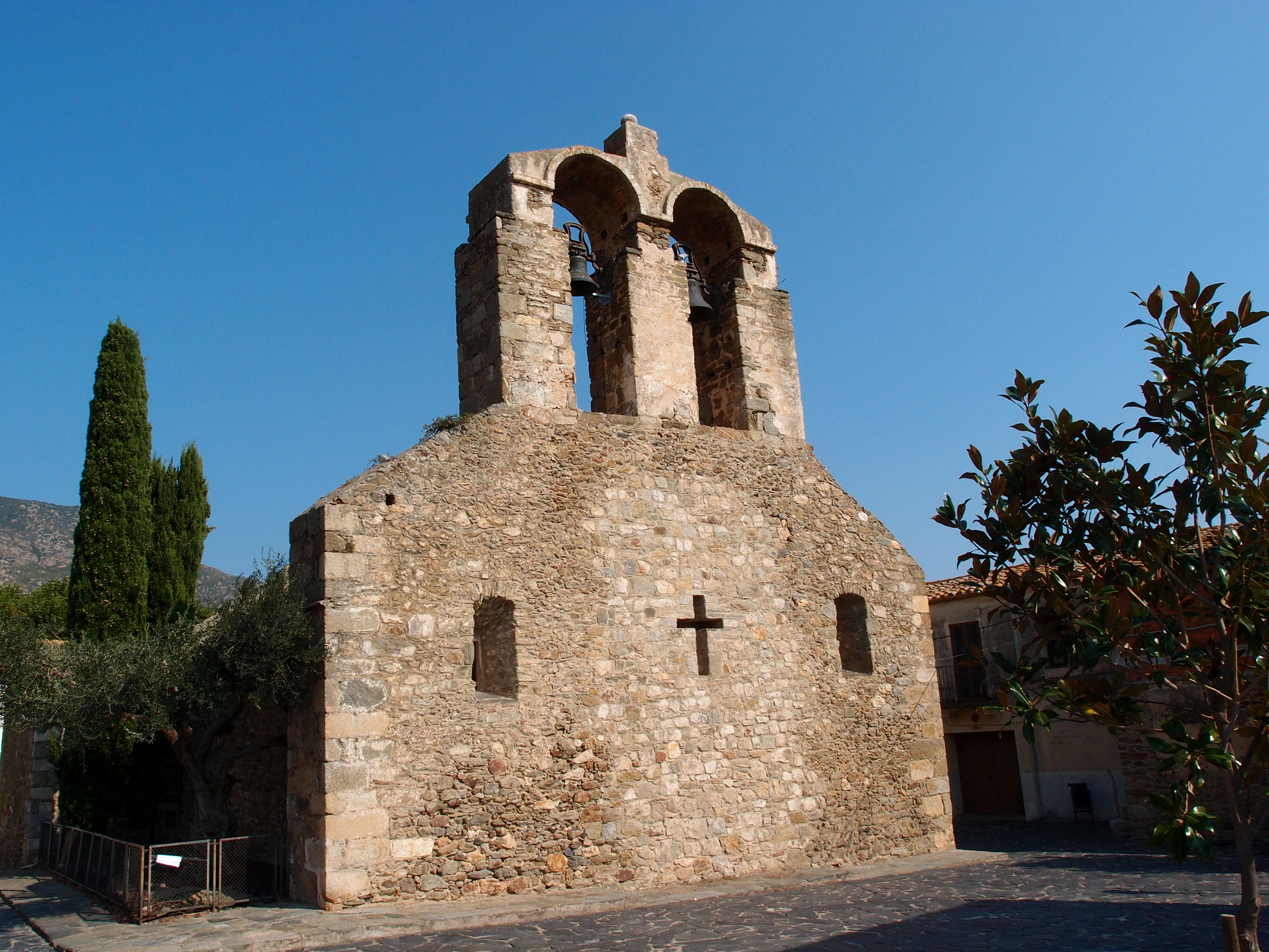 Die Església de Sant Joan in Palau-savedera Datum: 06.09.2012 Urheber: M. Pfeiffer alias Benutzer:Gordito1869 Quelle: privates Fotoarchiv des Urhebers